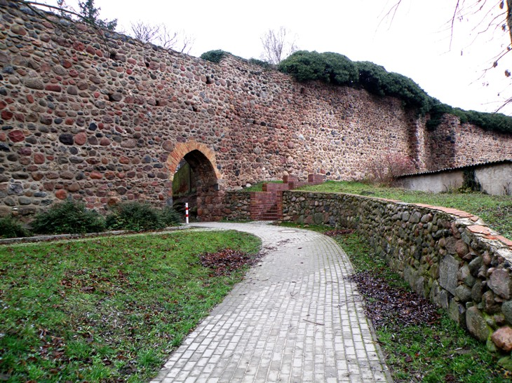 Gardziec Odrzański - przejście w murach miejskich